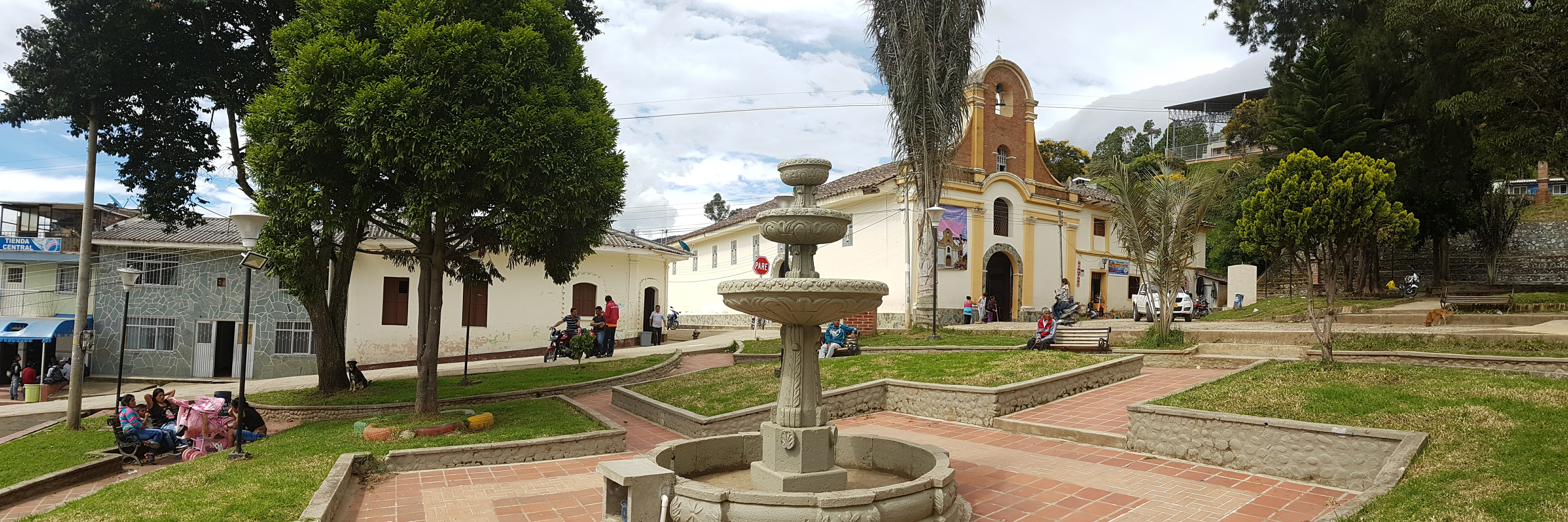 parque principal del municipio de Jambaló (Cauca - Colombia)